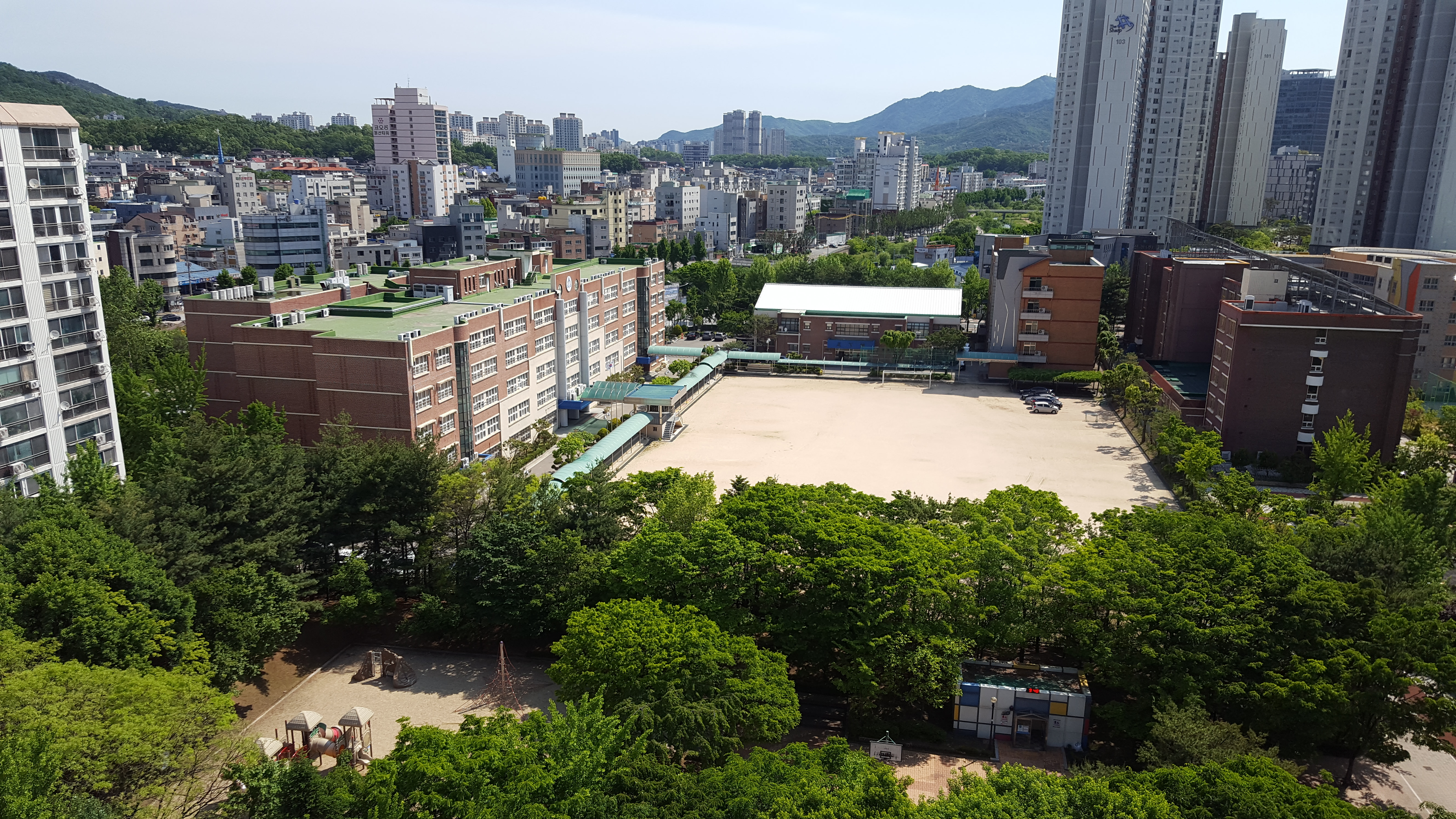 공작럭키아파트 505동에서 촬영한 평촌경영고등학교